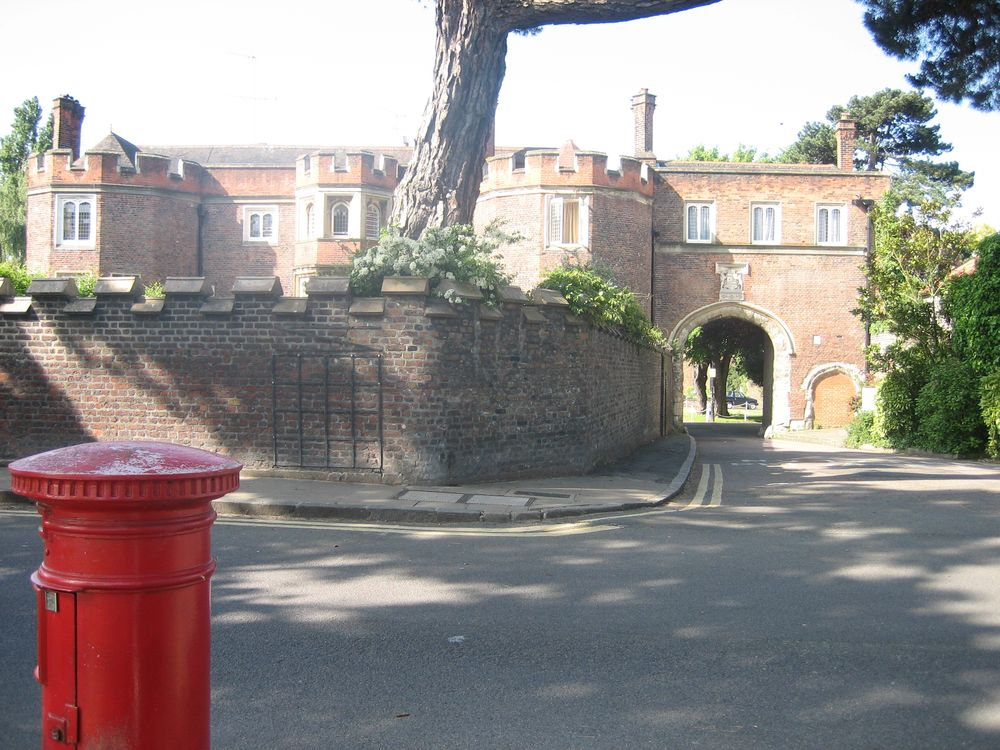 Richmond Palace - Château de Richmond